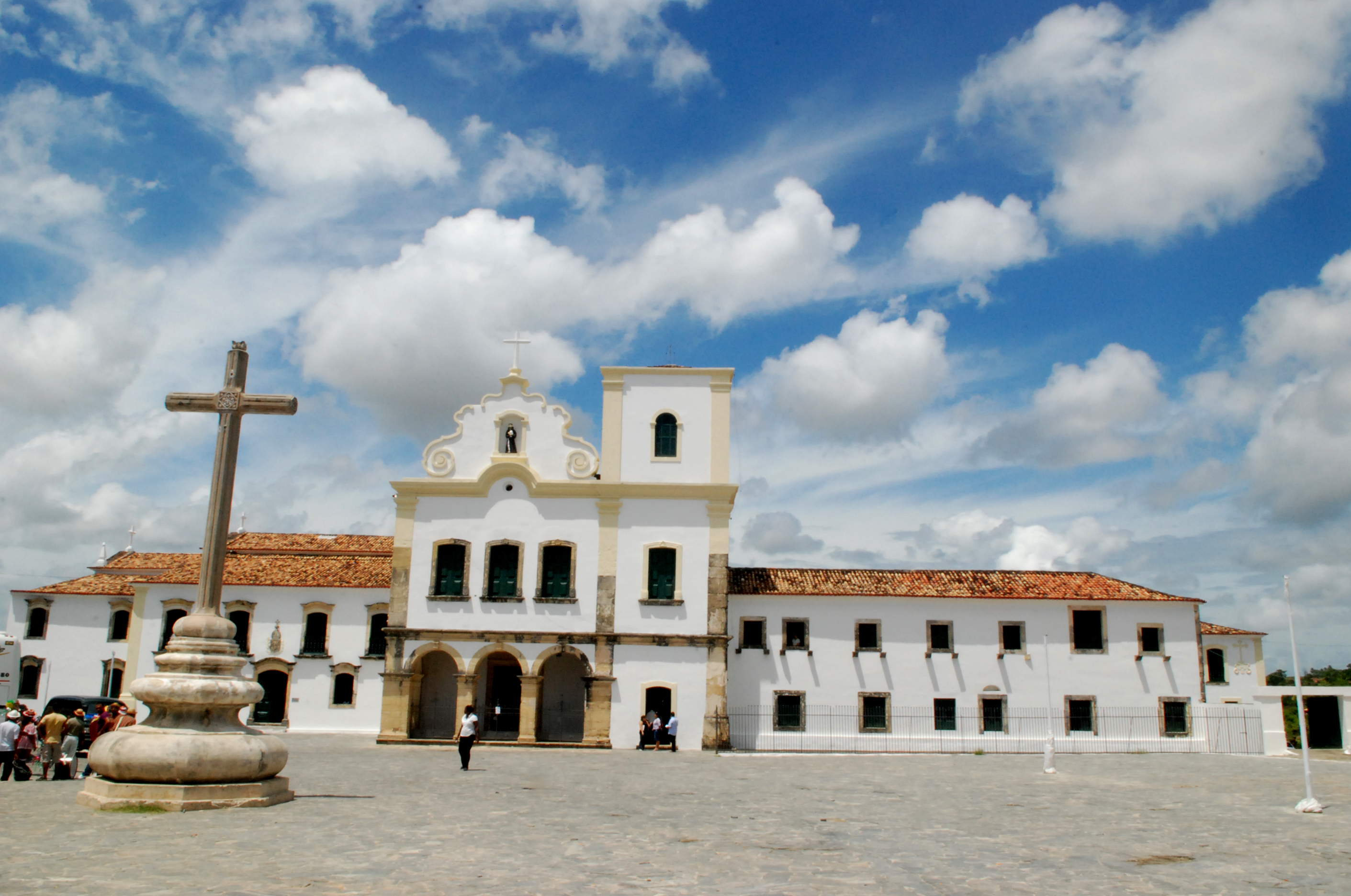 Praça São Francisco, localizada na cidade de São Cristóvão - SE. Foto: Wellingnton Barreto